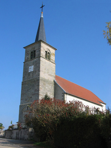 Eglise Saint-Martin